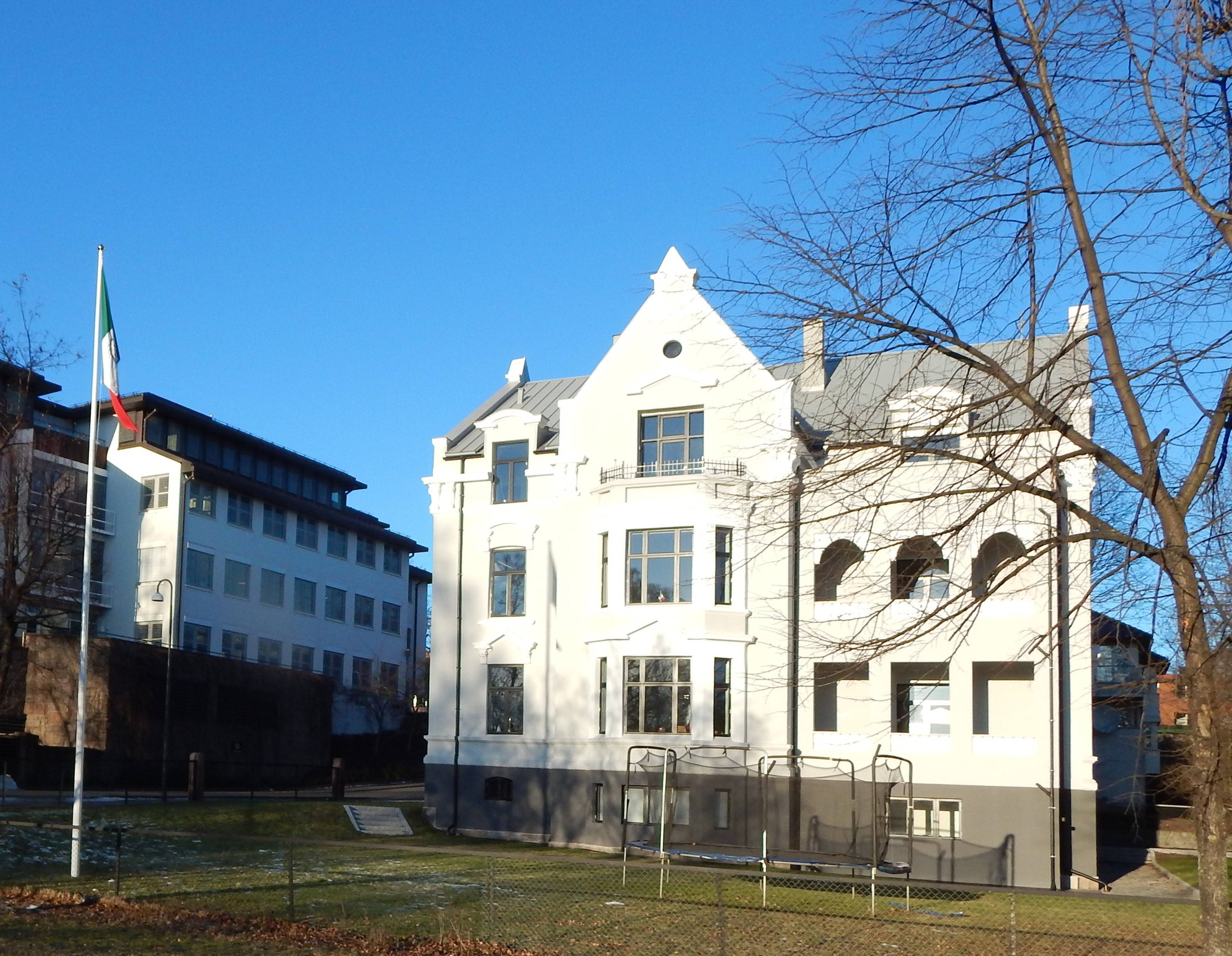 Frøyas gate 9 med Mexicos ambassade i Oslo